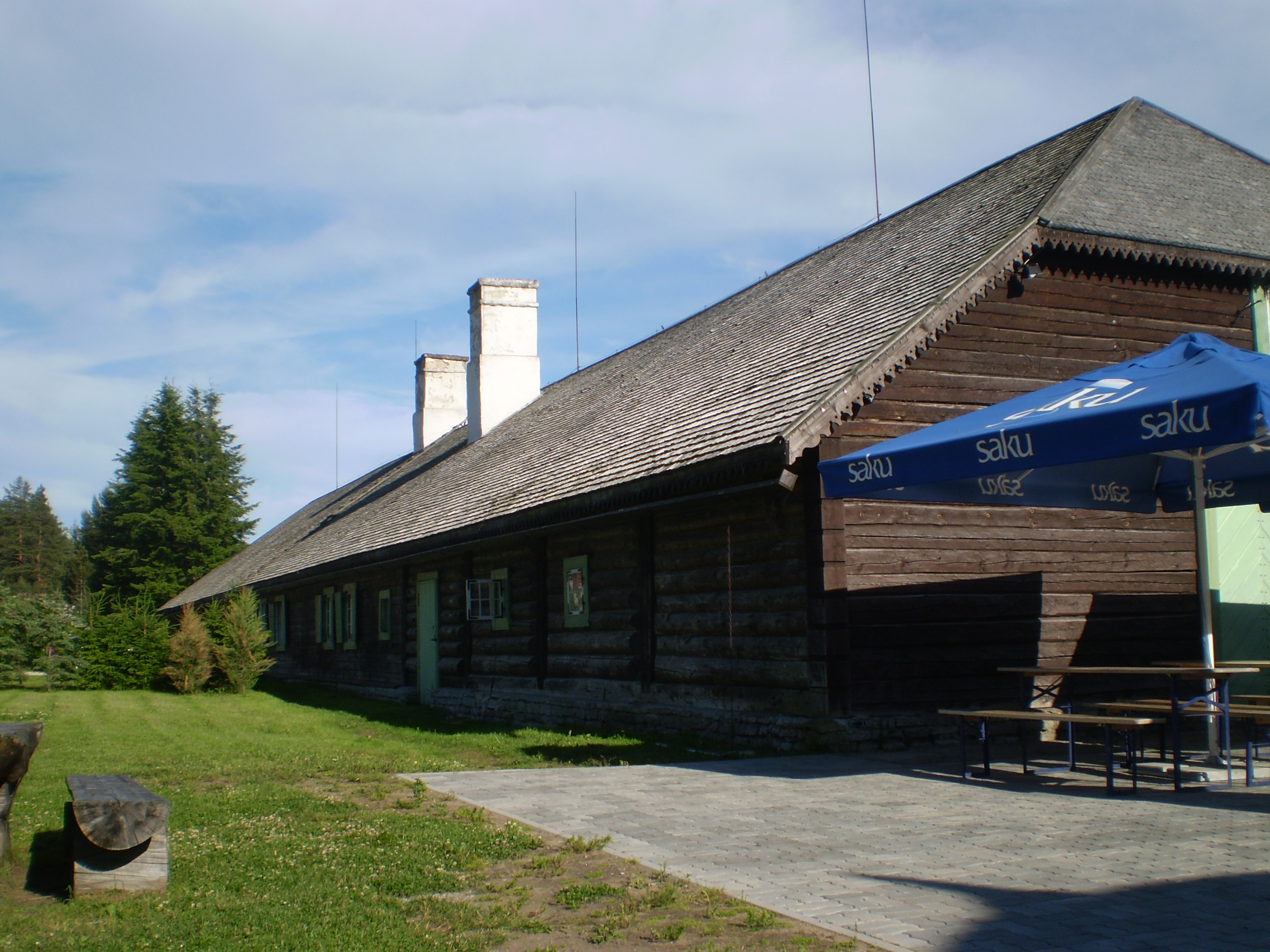 Viitna kõrtsihoone